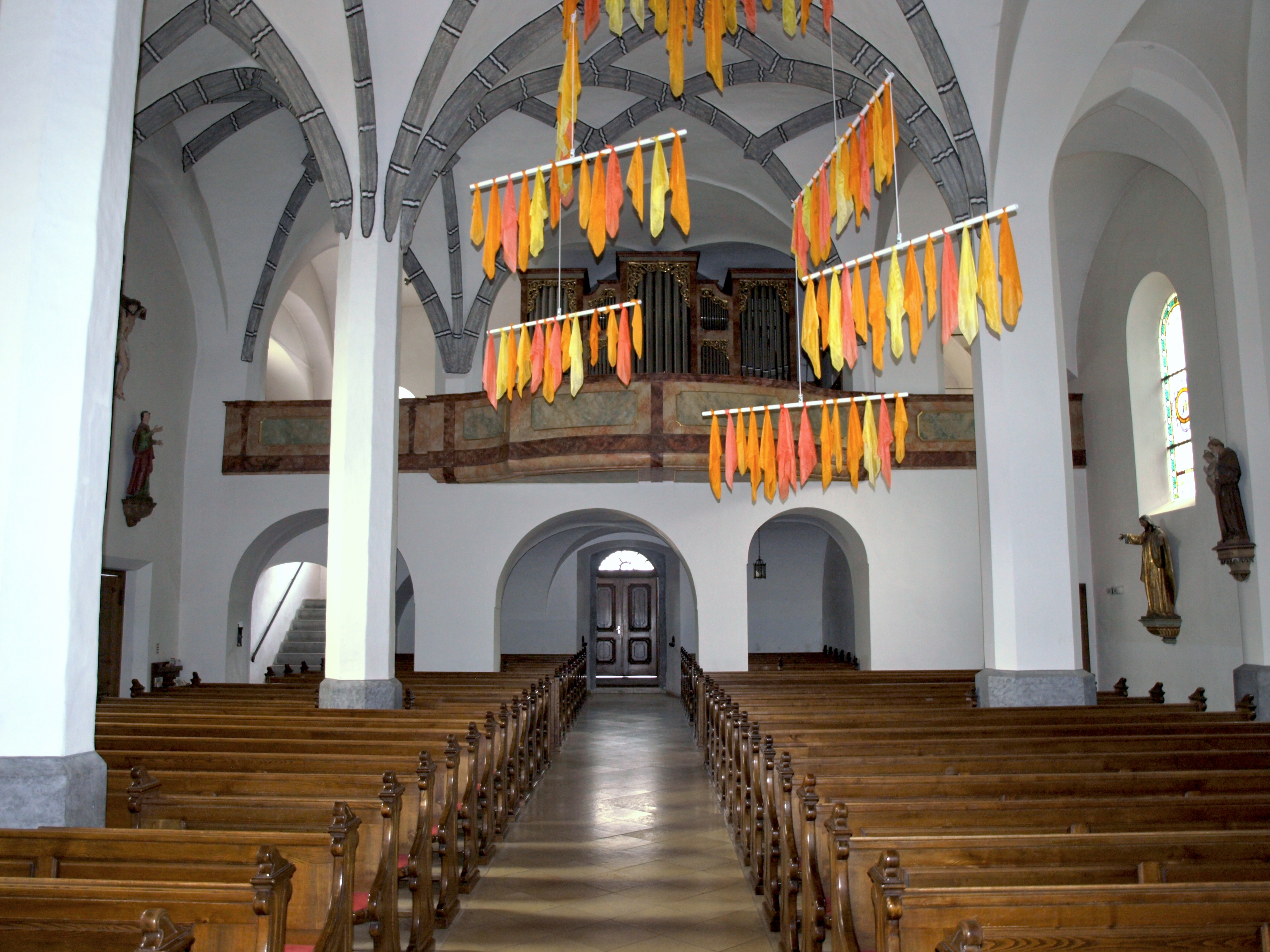 Kath. Pfarrkirche hl. Johannes der Täufer